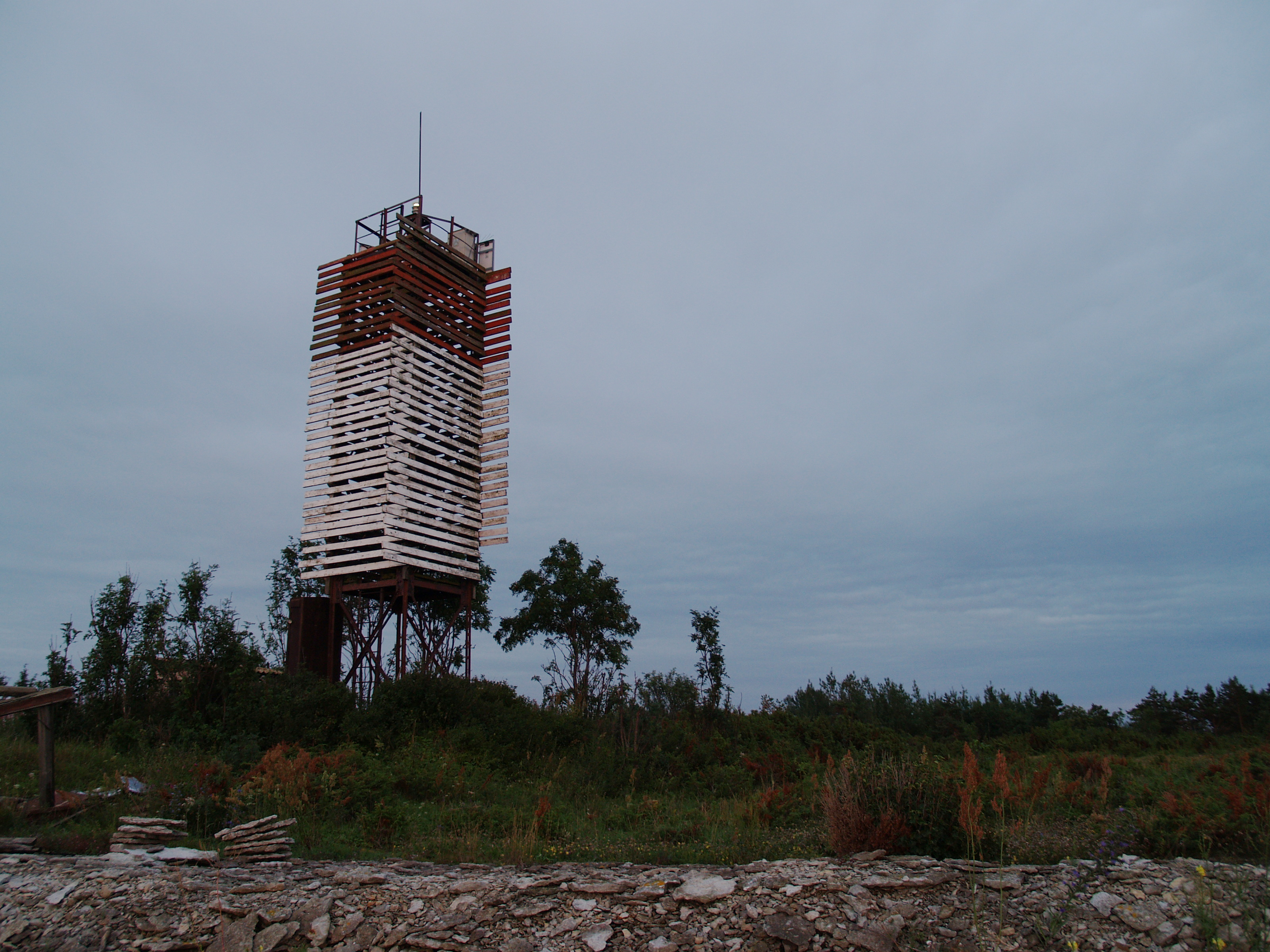 Suur-Pakri tulepaak saare põhjatipus.